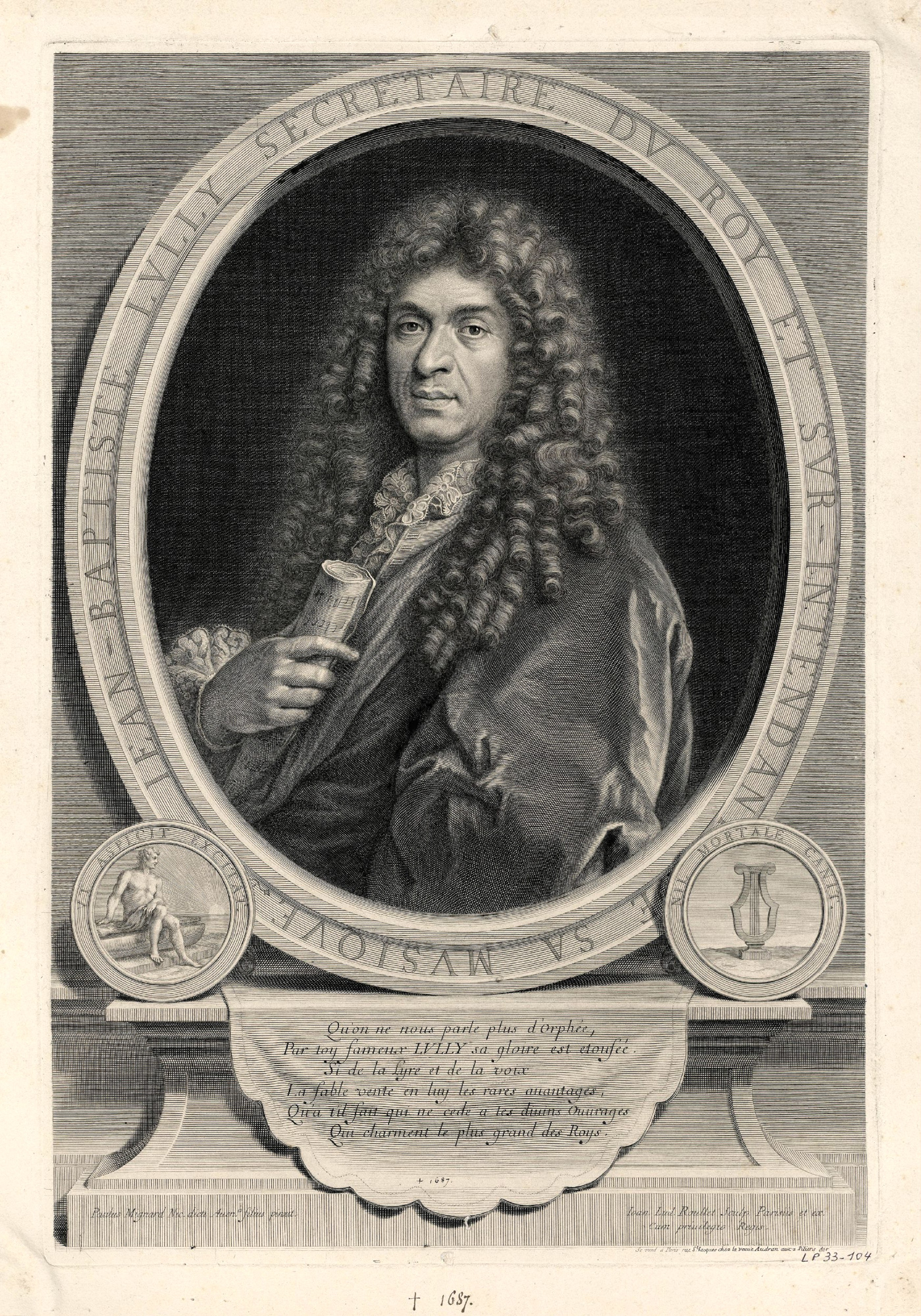 Stich mit dem Porträt Jean-Baptiste Lullys